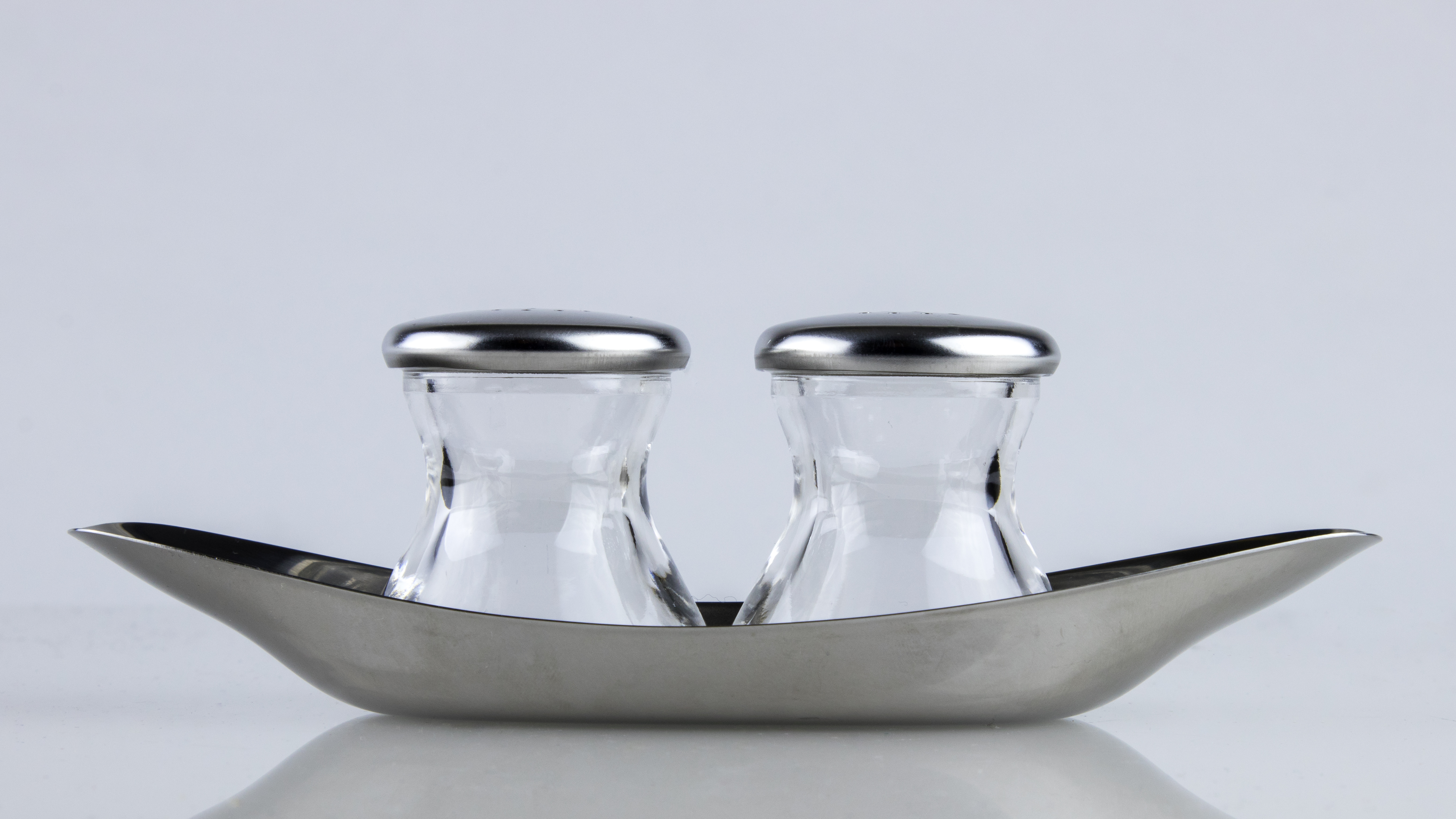 Salz- und Pfefferstreuer "Max & Moritz" von WMF, Entwurf: Wilhelm Wagenfeld